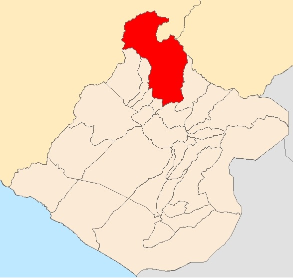 Mapa distrito Candarave,Tacna - Perú